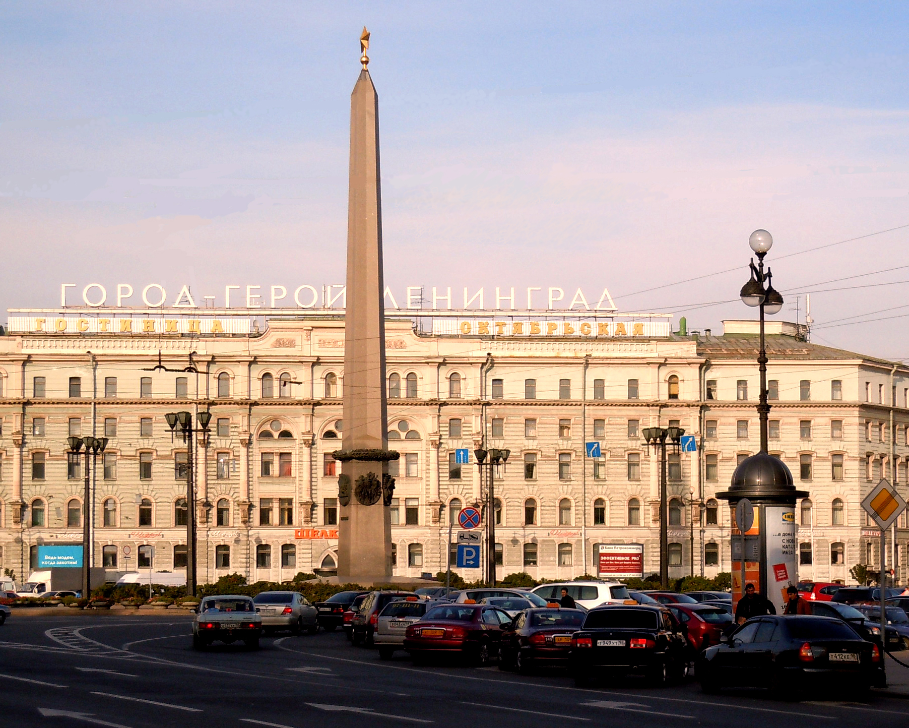 Площадь Восстания, Санкт-Петербург. На фотографии Обелиск «Городу-герою Ленинграду» (архитектор В.С.Лукьянов) и Гостиница «Октябрьская»